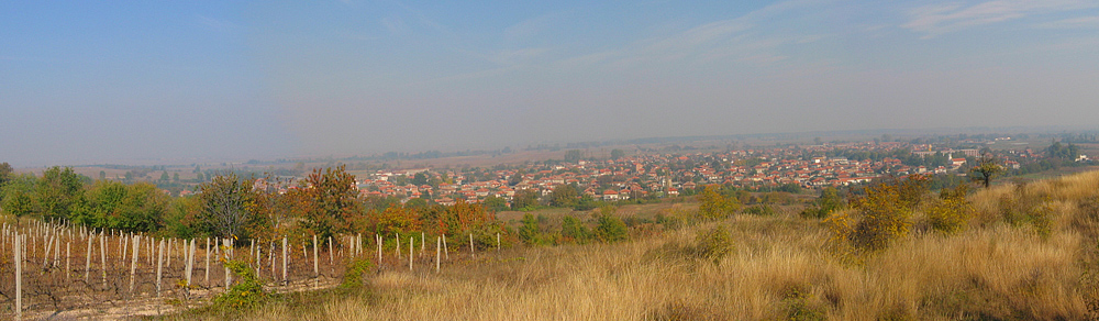 Село Поповица, гледано отгоре